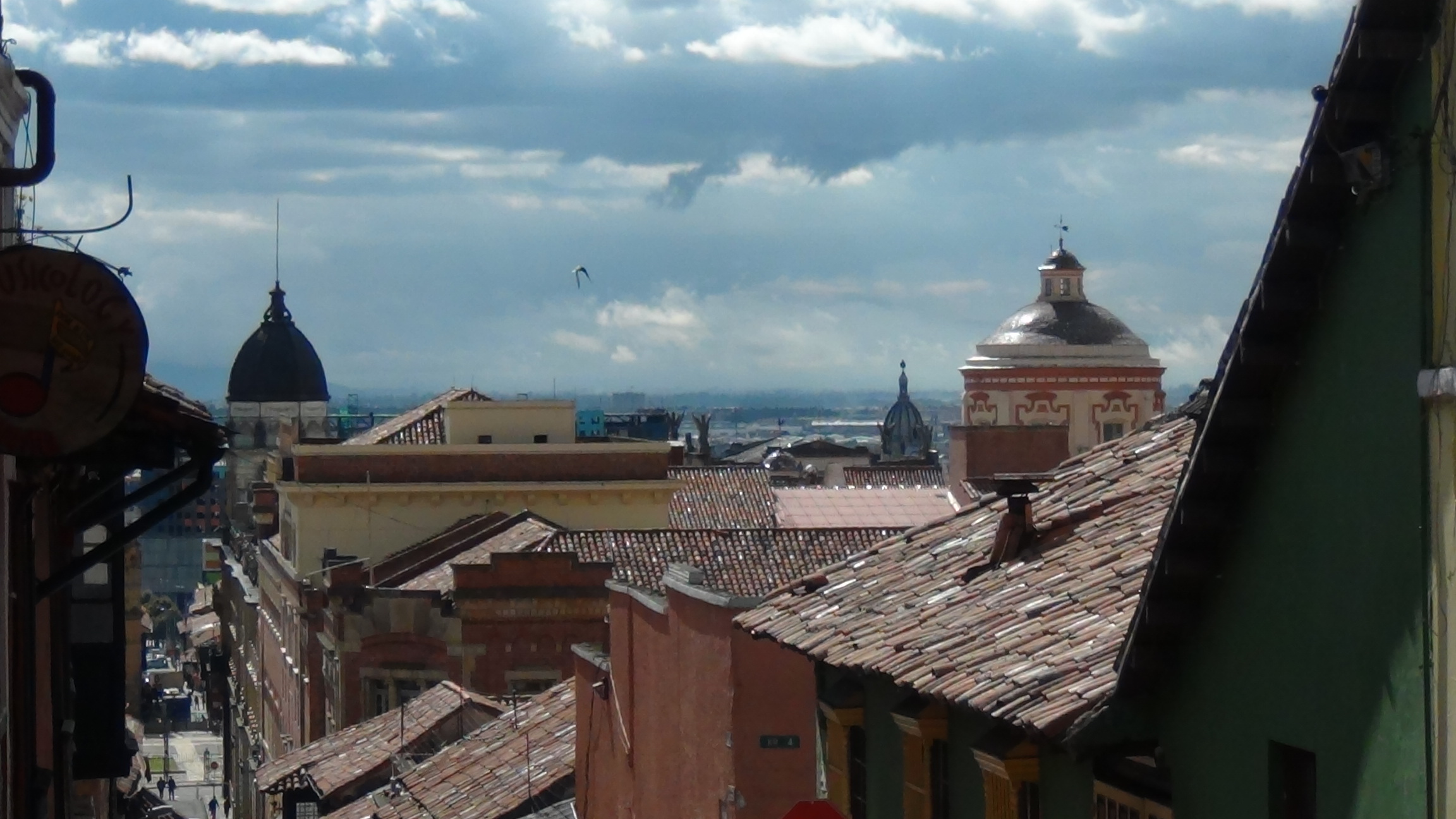 Se observan el Torreón de la Bandera y la Cúpula de la Iglesia de San Ignacio del Colegio Mayor de San Bartolomé.